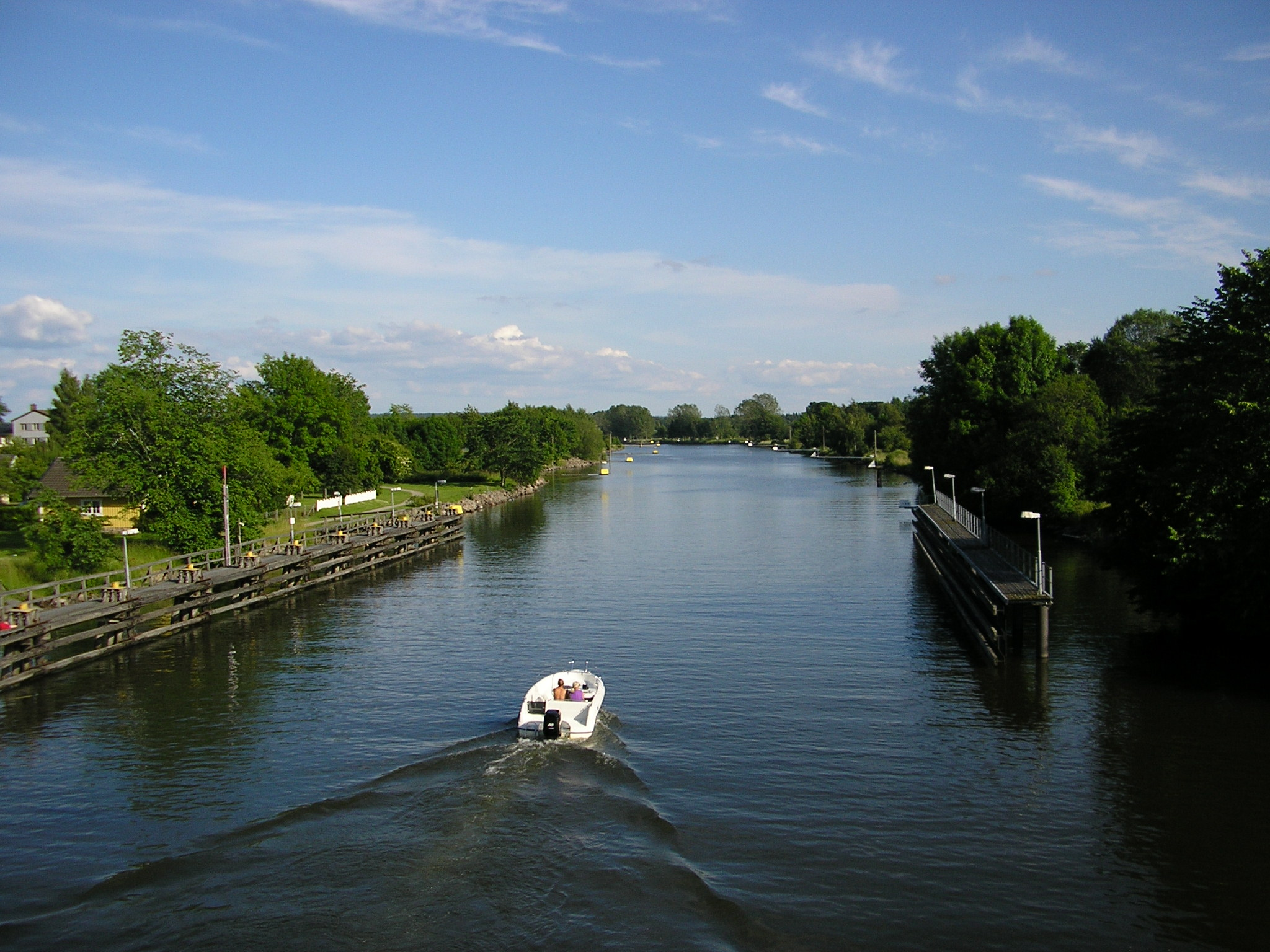 Karls grav sedd från Gropbron, juni 2011.